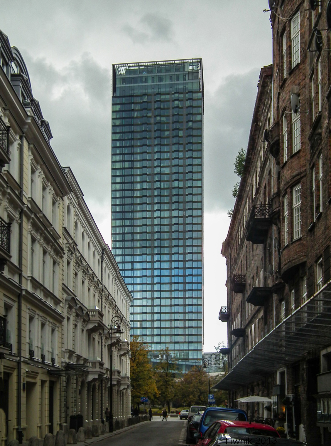 Widok na wieżowiec Cosmopolitan Twarda 2/4 z ulicy Próźnej w Warszawie